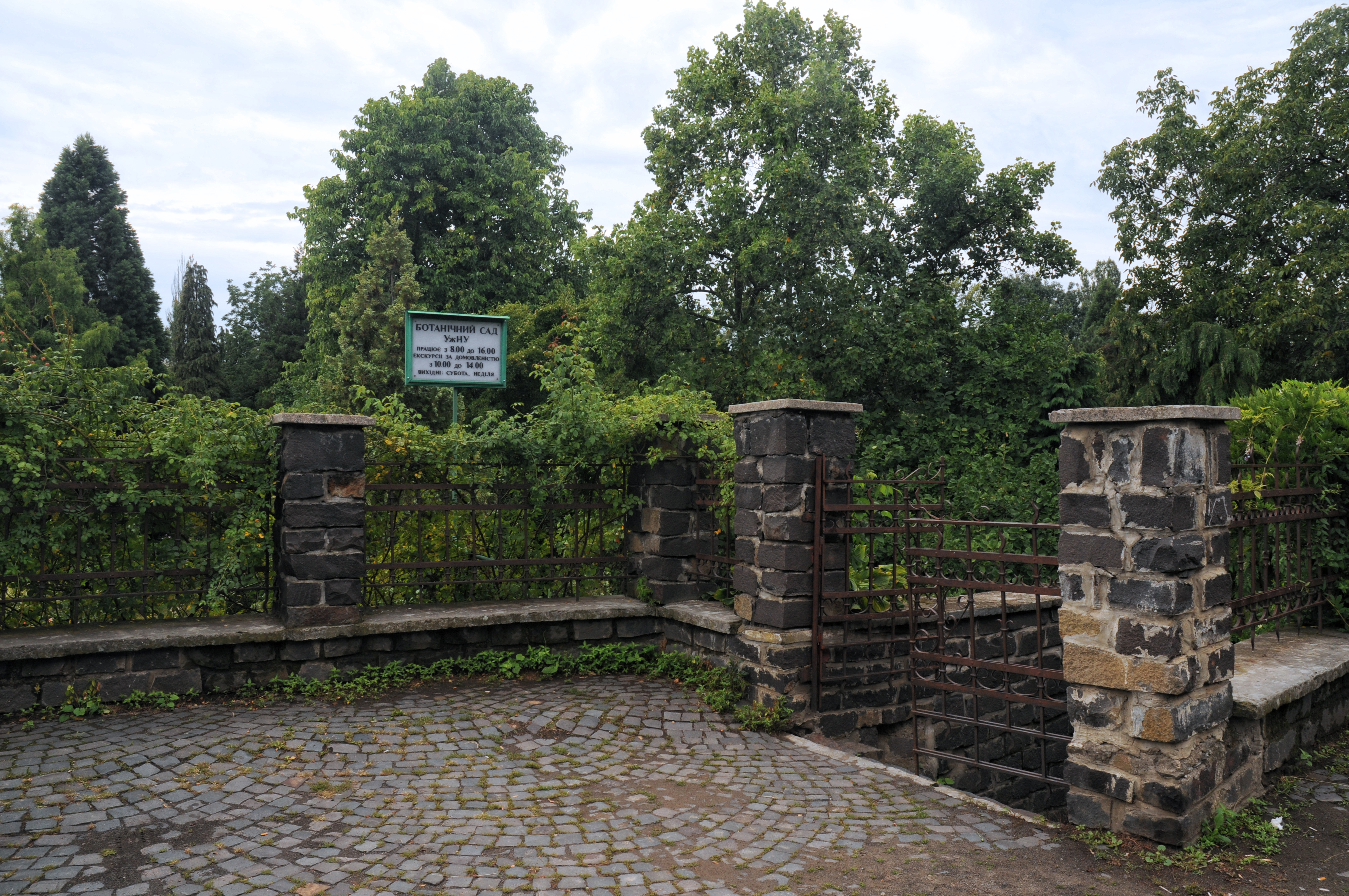 Ужгородський ботанічний сад